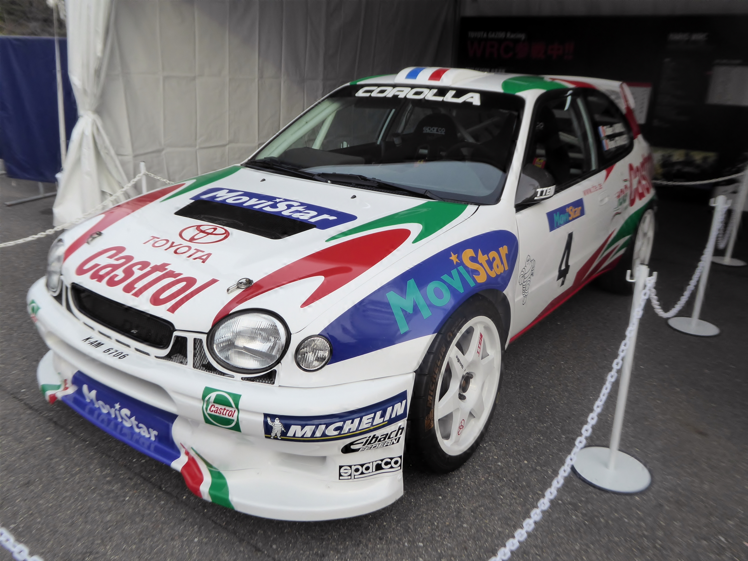 トヨタ・カローラWRCの1998年仕様をフロントから撮影。